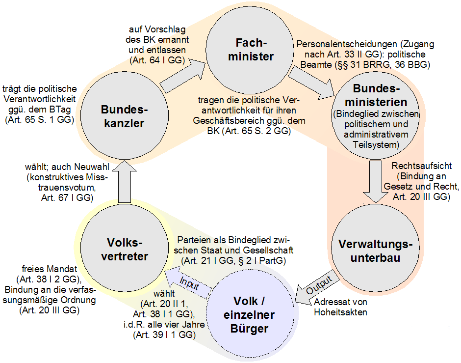 Legitimationskette der unmittelbaren Staatsverwaltung der Bundesebene, vereinfacht Autor: C.Löser Erstellt mit: de: Draw